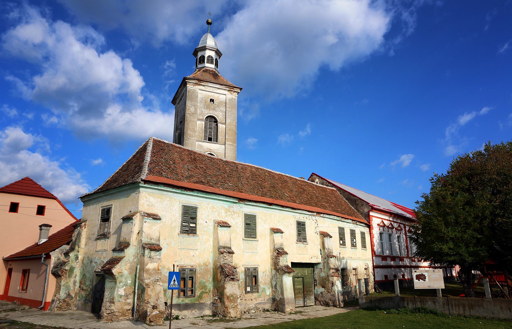 Biserica evanghelică 01